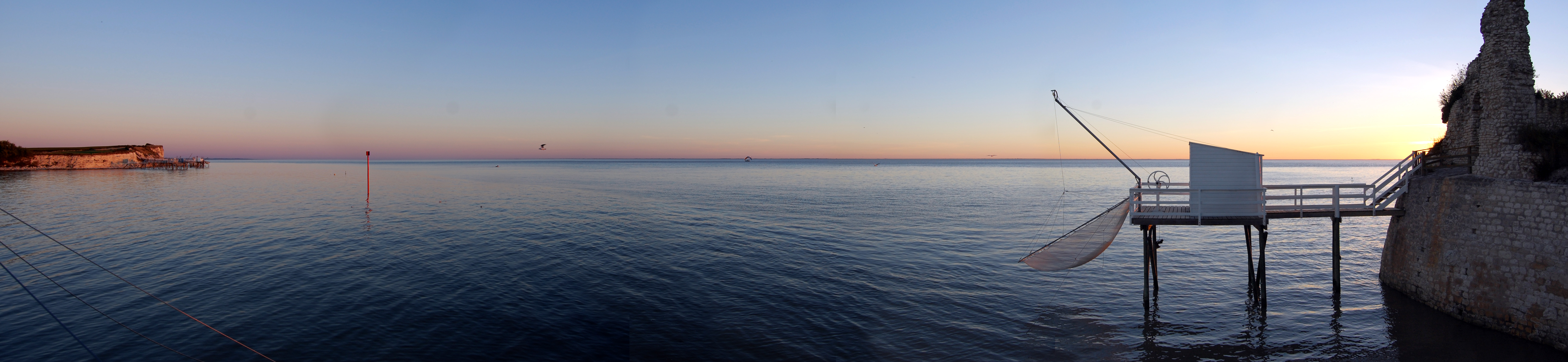 Carrelet à Talmont-sur-Gironde (soleil couchant)